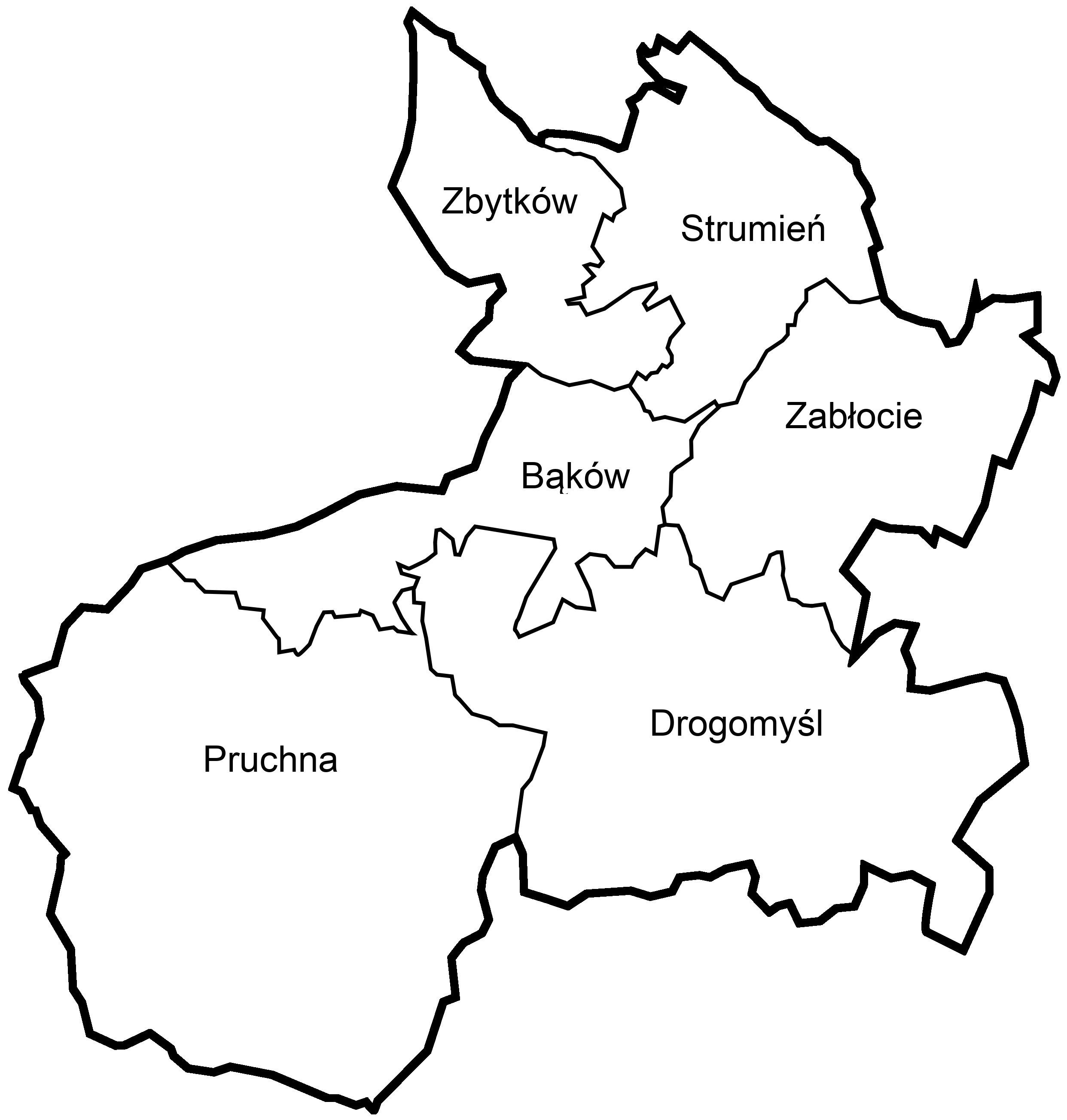 Gmina Strumień (powiat cieszyński)